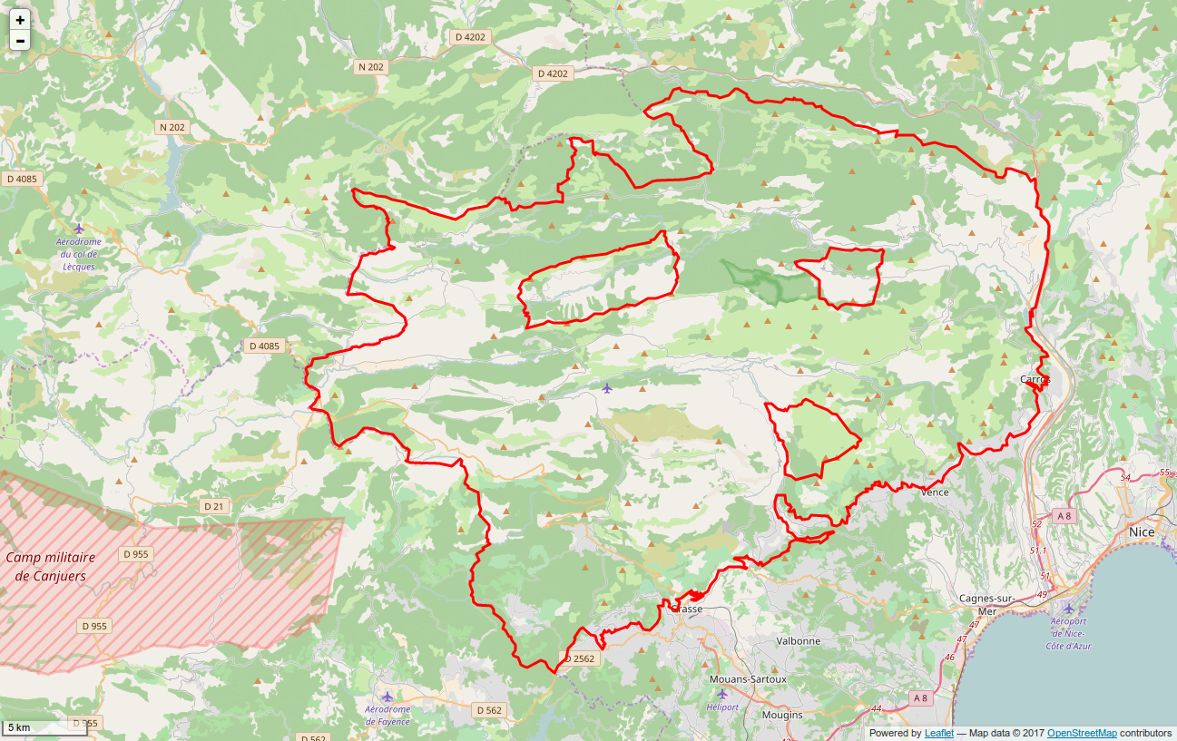 Périmètre du PNR des Préalpes d'Azur